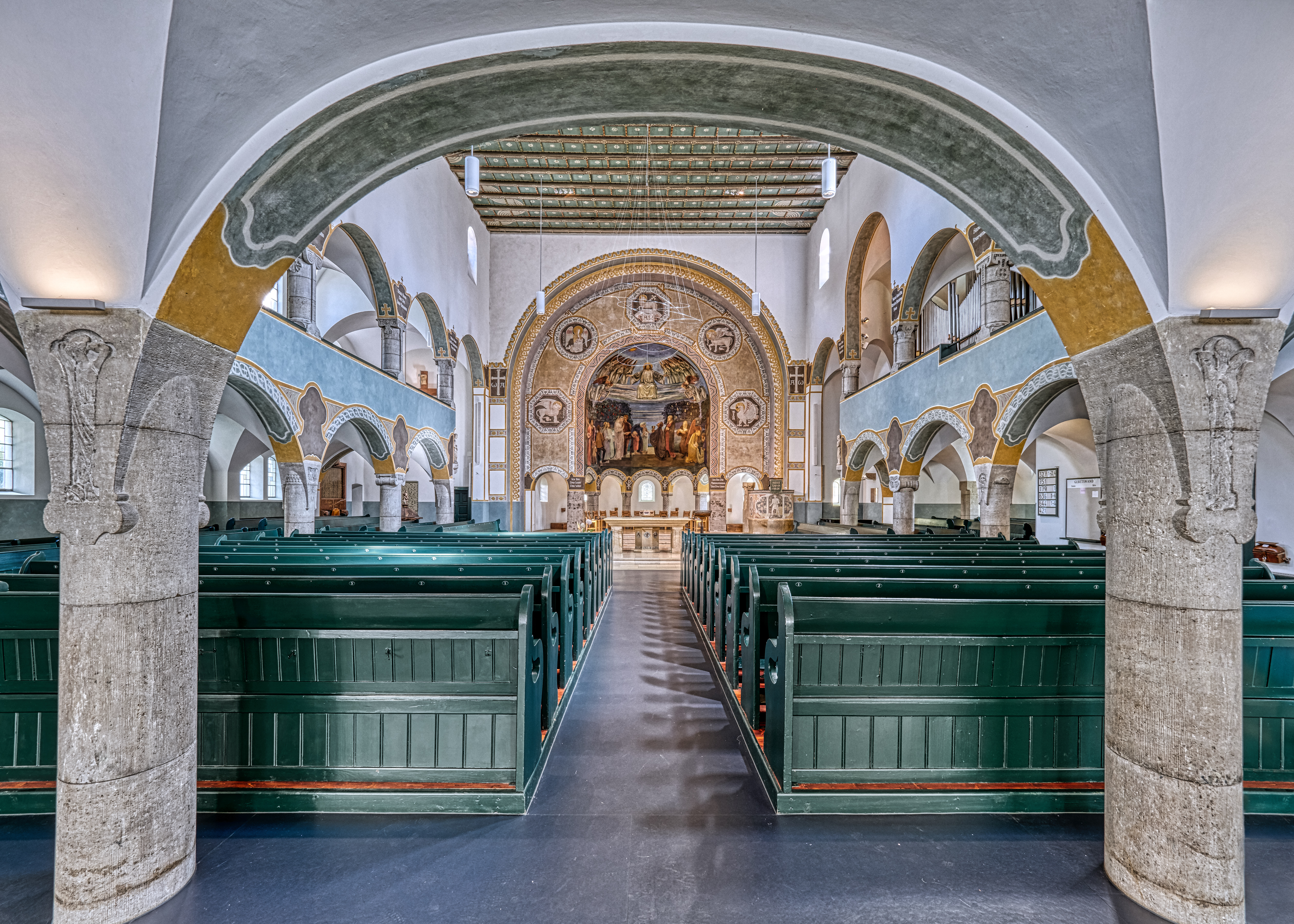 Moderne Basilika mit neoromanschen Elementen. Die Erlöserkirche ist die erste Kirche in Bayern, in der die Anordnung von Kanzel, Altar, Taufstein und Orgel es der Gemeinde ermöglicht, Wort und Sakrament nahe zu erleben.This is a photograph of an architectural monument.